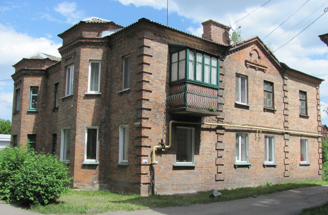 Застройка центральной части Казатина. Жилой дом.